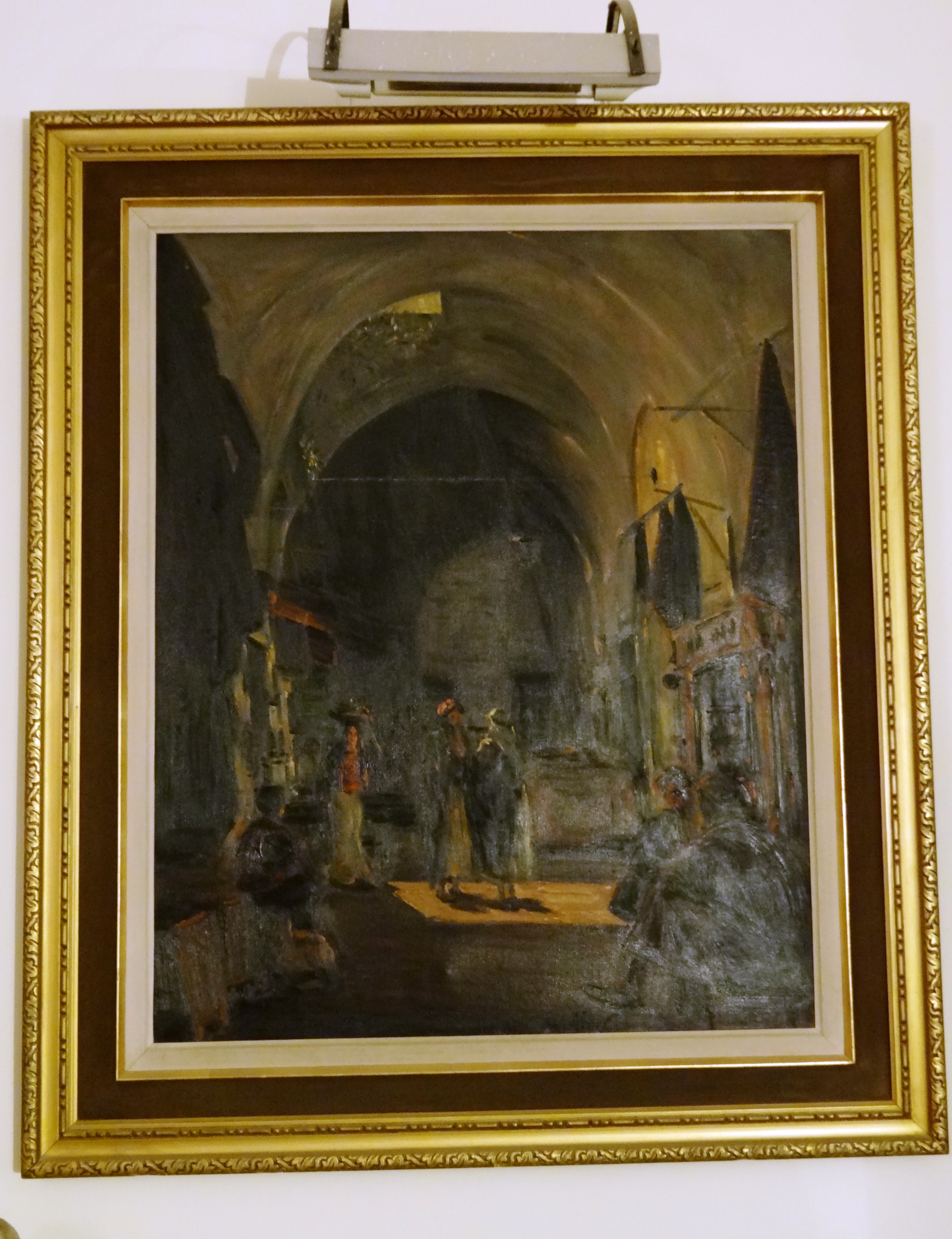 Ludwig Blum , an Israeli painter (1891- 1974) painted portraits such as High Commissioners of Palestine, Abdullah I of Jordan, Moshe Dayan לודוויג בלום (1891 - 1974) היה צייר ישראלי ואחד מאחד ממייסדי "מכבי" בצ'כוסלובקיה. שוק בעיר העתיקה, שמן על בד, גודל 100 כפול 79 ס"מ, צויר בשנת 1944